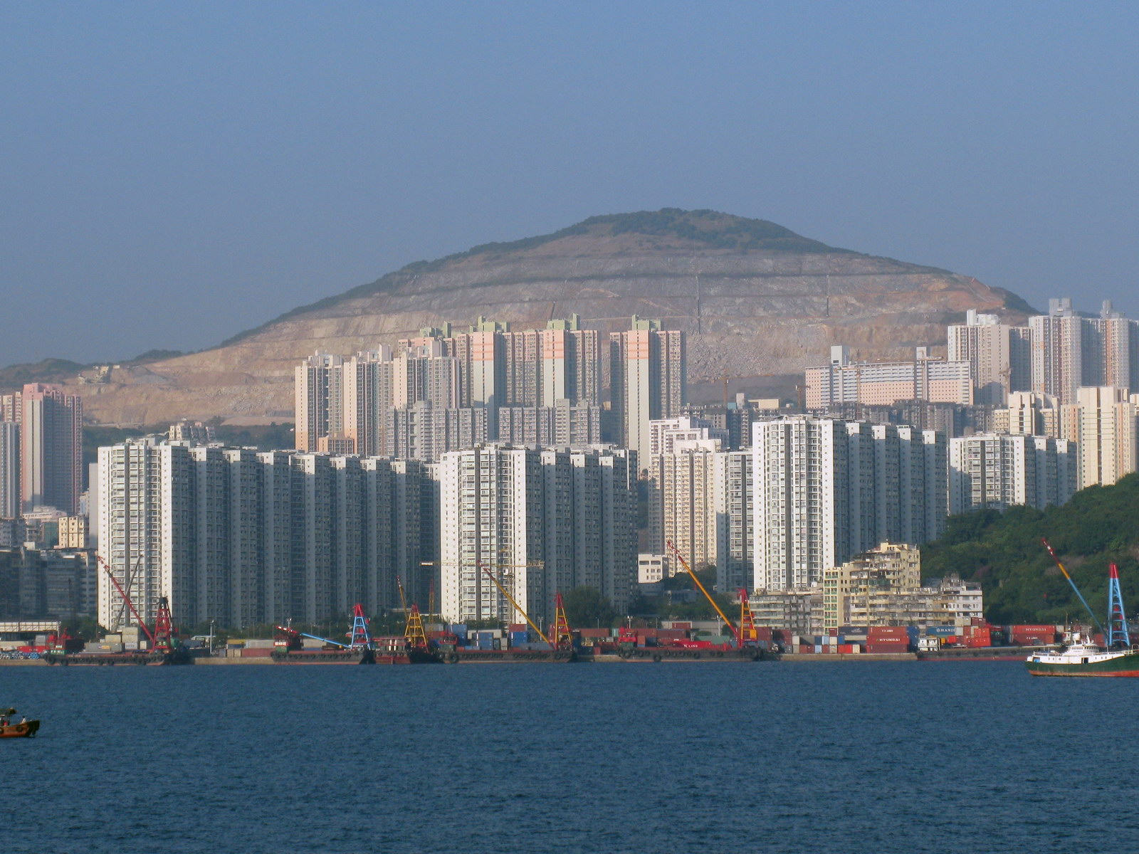 藍田-麗港城 Laguna City, Lam Tin